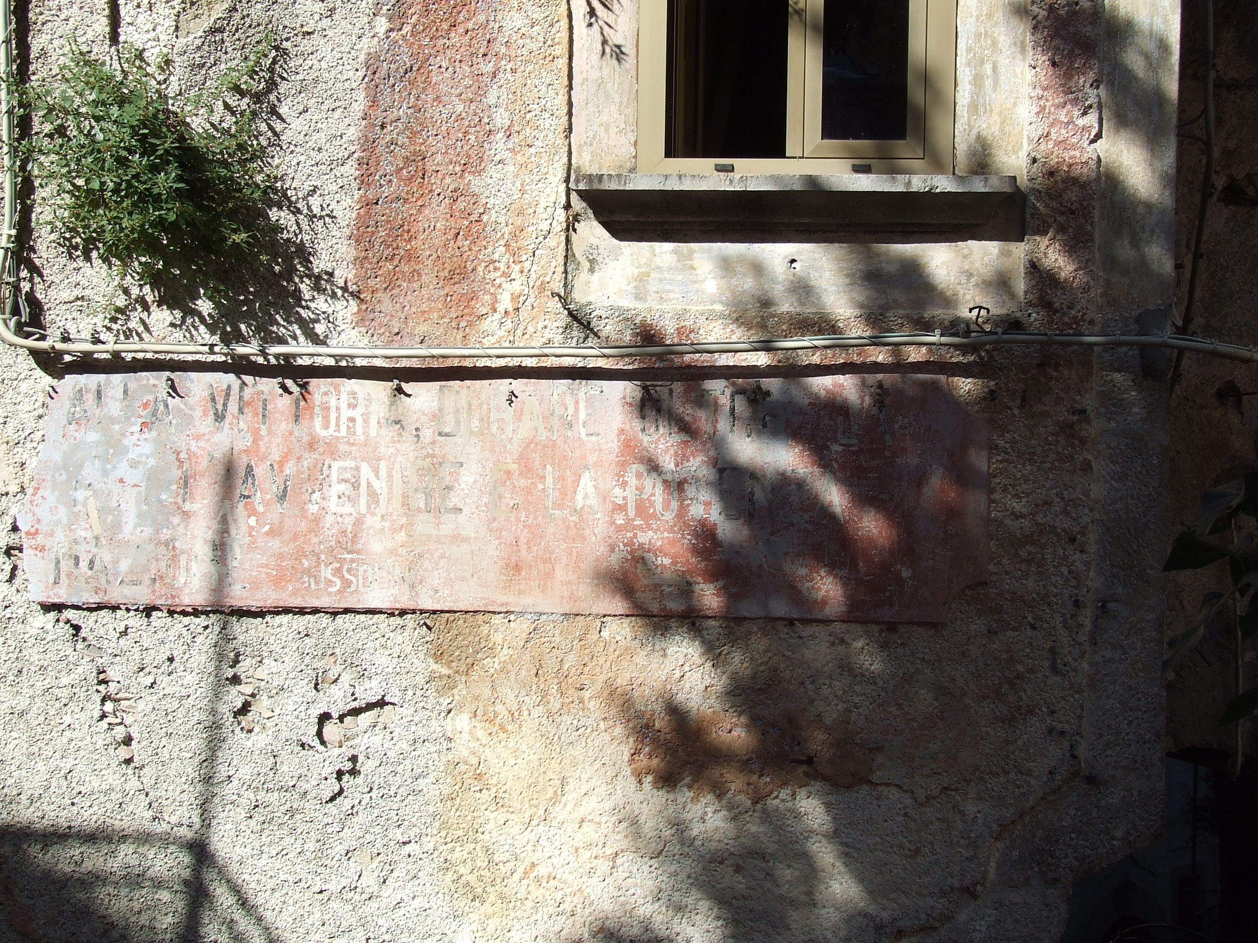 Motto fascista ancora visibile in Caggiano, tratto dalla frase di Benito Mussolini: "Durare sino alla vittoria ! Durare oltre la vittoria, per l'avvenire e la potenza della nazione." Si legge (nonostante la mancanza del pezzo sinistro dell'iscrizione): alla vittoria, durare oltre la [...] l'avvenire e la potenza nazione. Mussolini